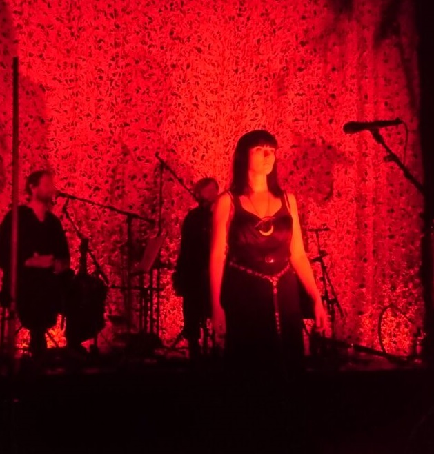 Lindy Fay Hella